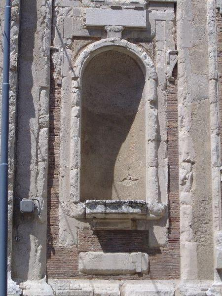 Church Messina Chiesa di San Giovanni di Malta